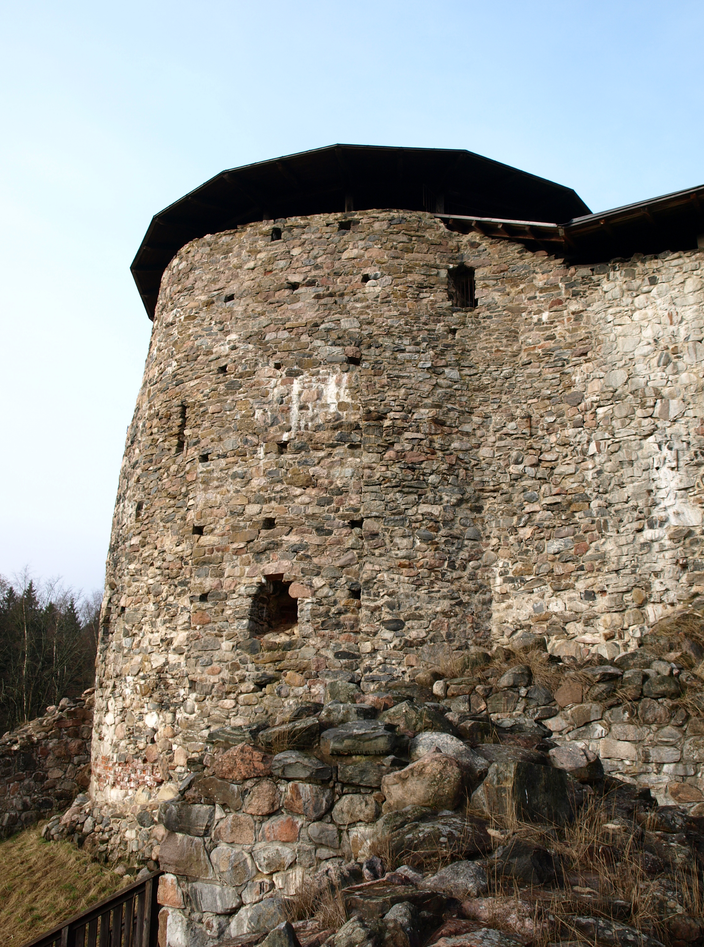 Die Burgruine Raseborg bei Snappertuna (Südfinnland)